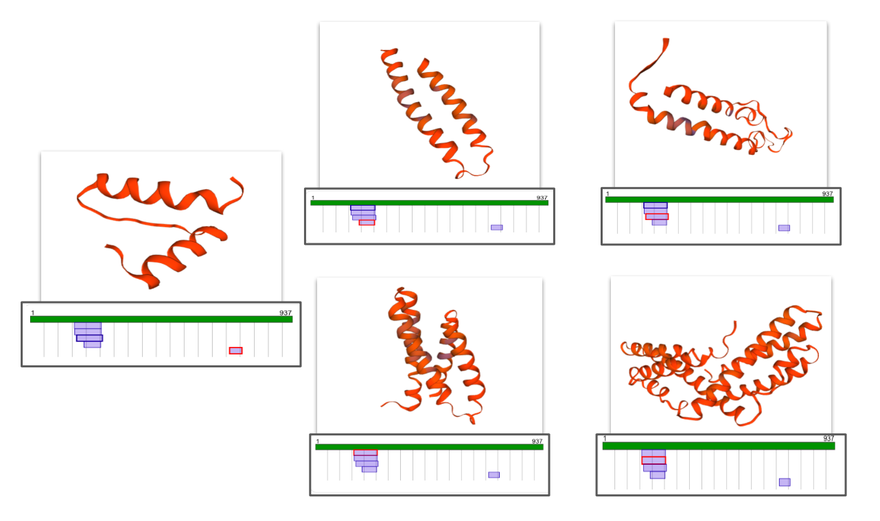 Gràcies a l’obtenció de la seqüència d’aminoàcids de la proteïna es poden analitzar les seves homologies amb diferents models d’estructures ja cristalitzades i estudiades, és per això que hem pogut obtenir l’estructura tridimensional d’algunes de les parts de SMCR8. Com es pot observar a les imatges, predomina l’estructura secundària hèlix alfa.